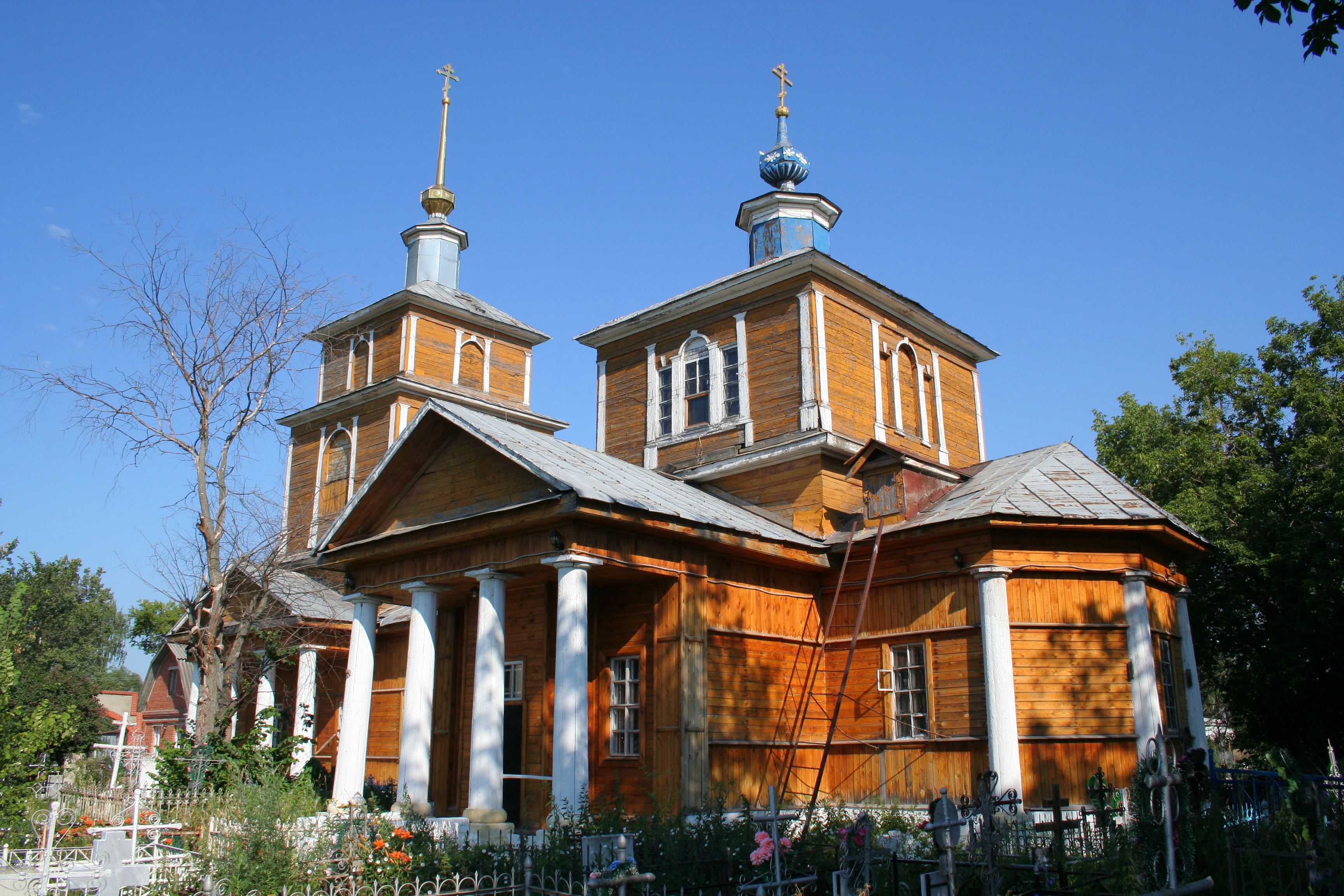 Stadt Spassk (Oblast Rjasan, Russland). Christi-Himmelfahrtskirche auf dem Friedhof der Stadt.